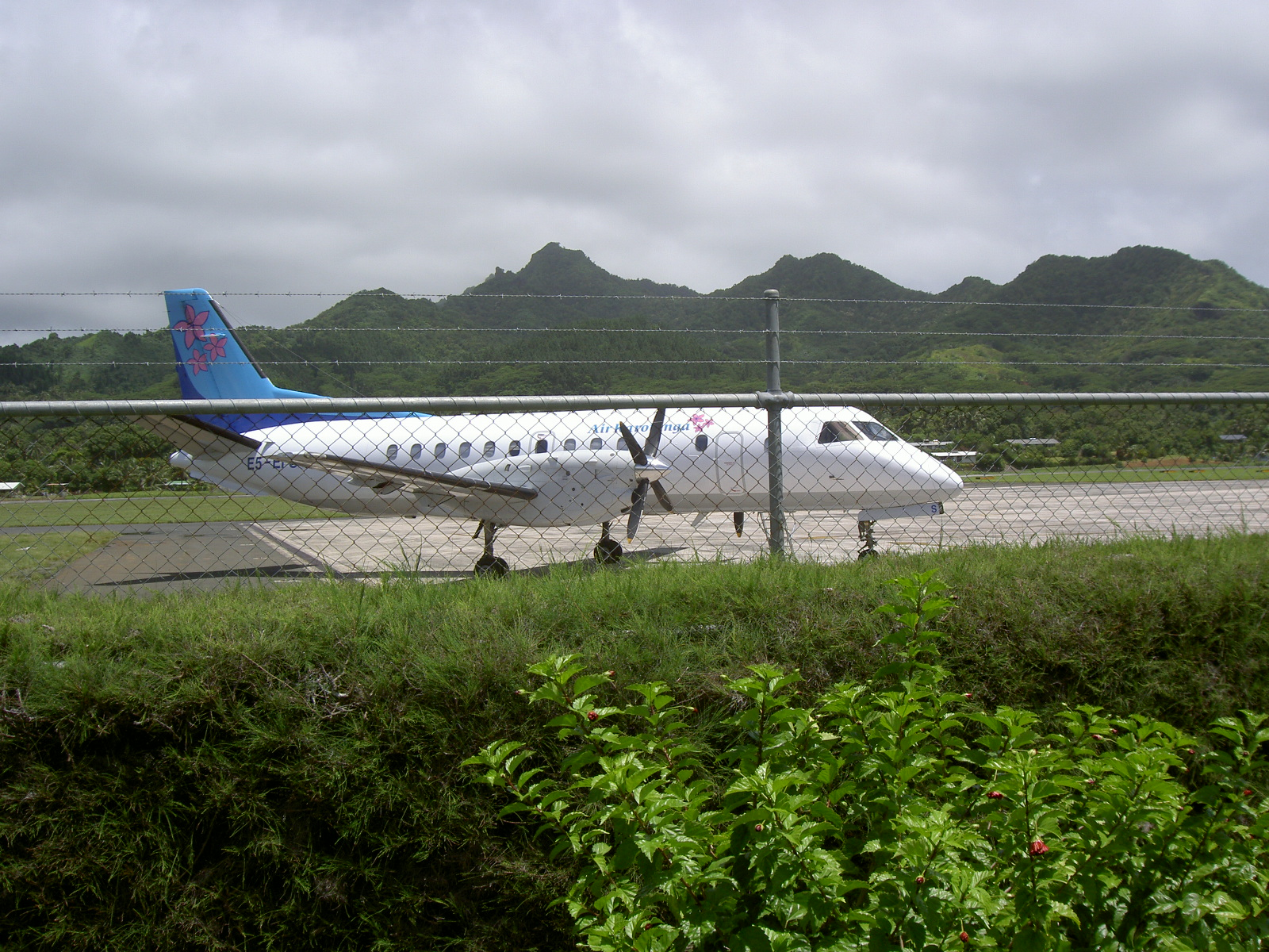 An Air Rarotonga Saab 340A (E5-EFS).